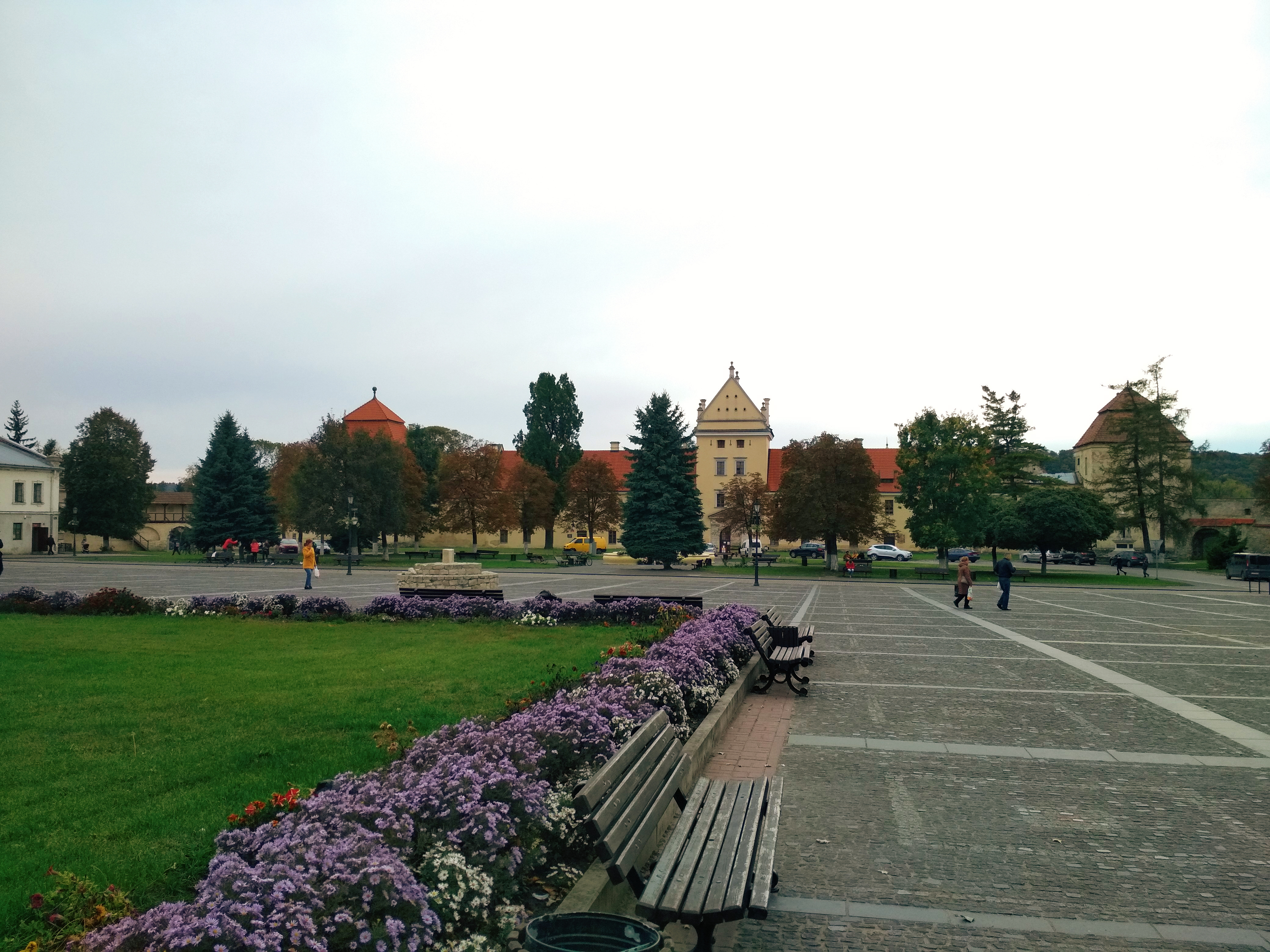 Żółkiew - widok z Rynku na zamek